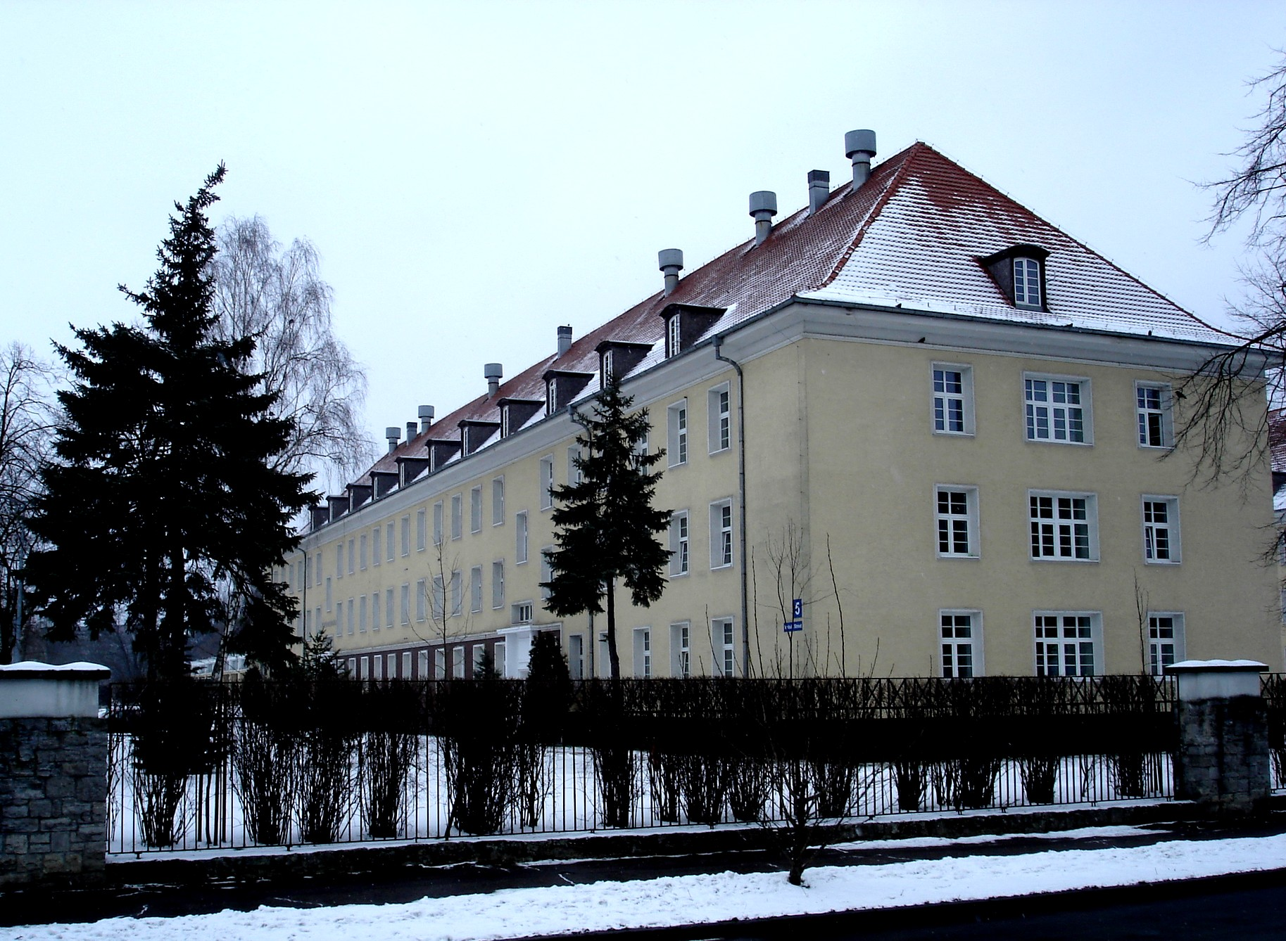 Koszary przy ul. Łukasińskiego Szczecin